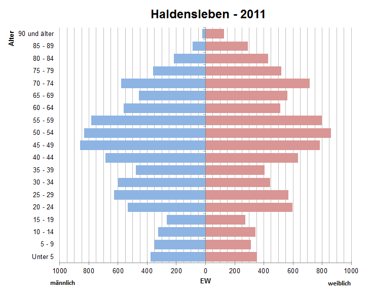 Bevölkerungspyramide der Stadt Haldensleben nach Zensus 2011.